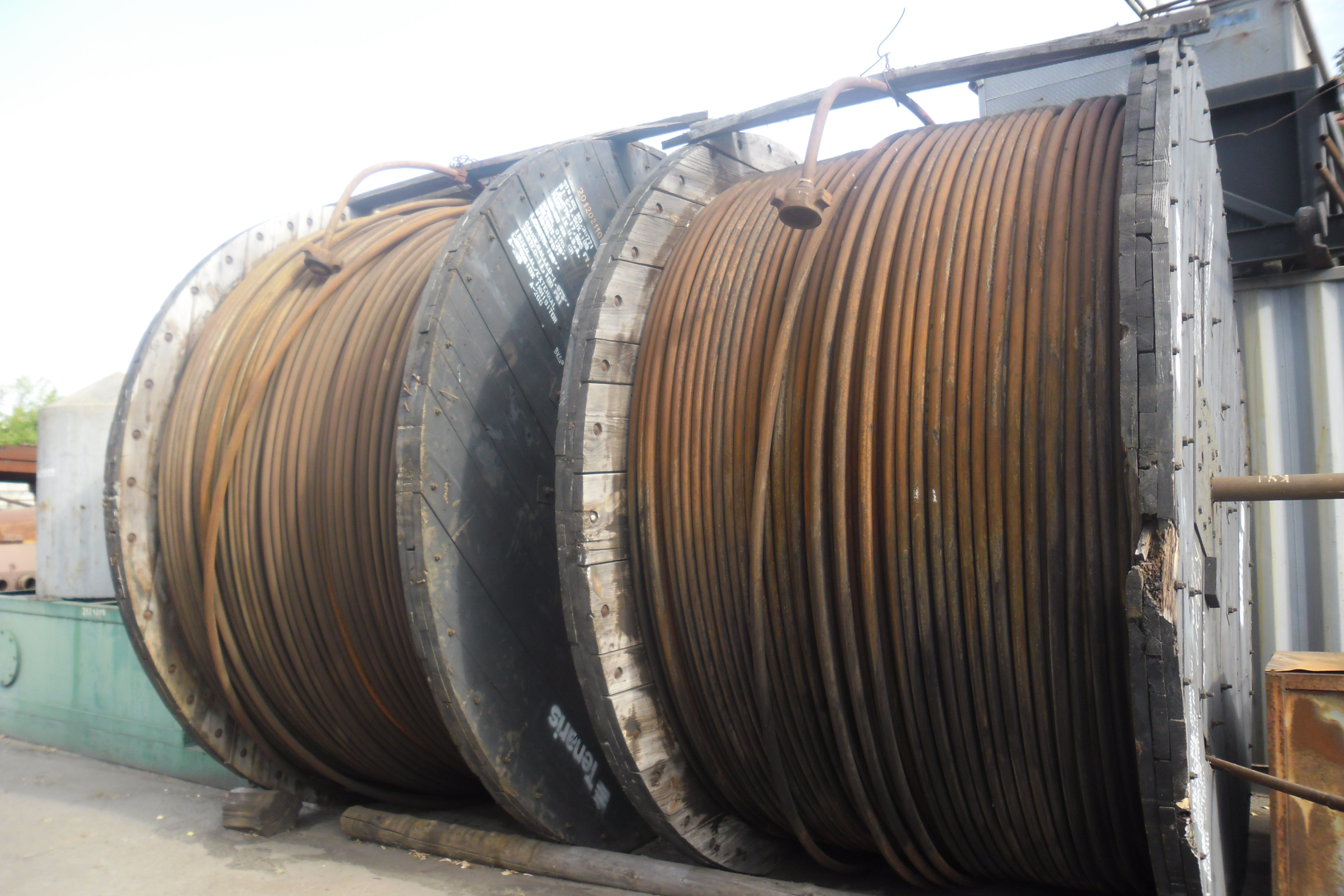 Фото